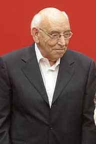 11-01-2012 Entrega premios nacionales